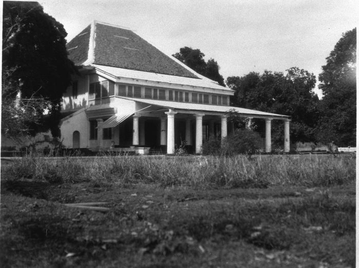 Foto. Oud residentiehuis te Besoeki aan de Straat Madoera, Oost-Java